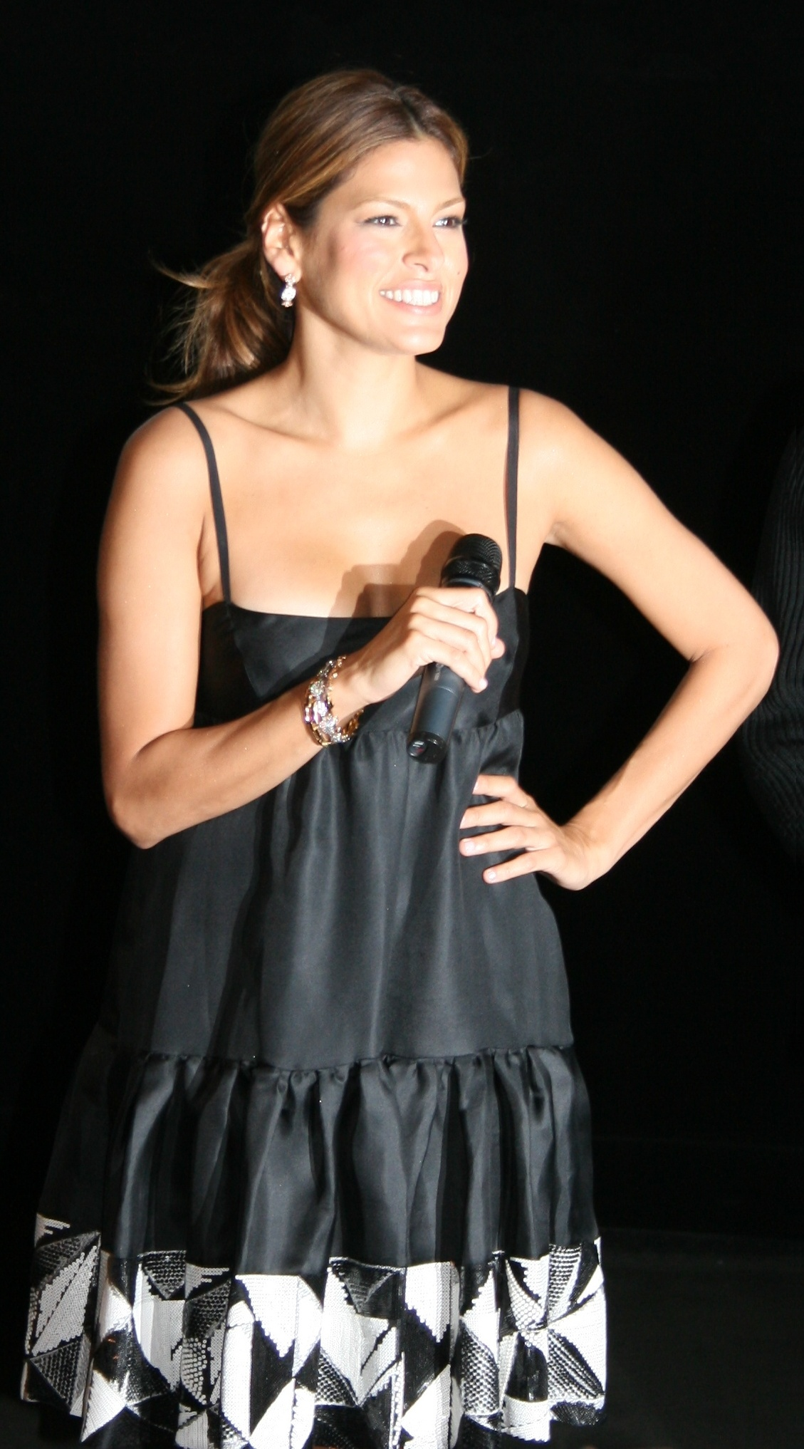 Eva Mendes à l'avant-première de Live ! diffusée à l'UGC Ciné Cité Les Halles, à Paris.